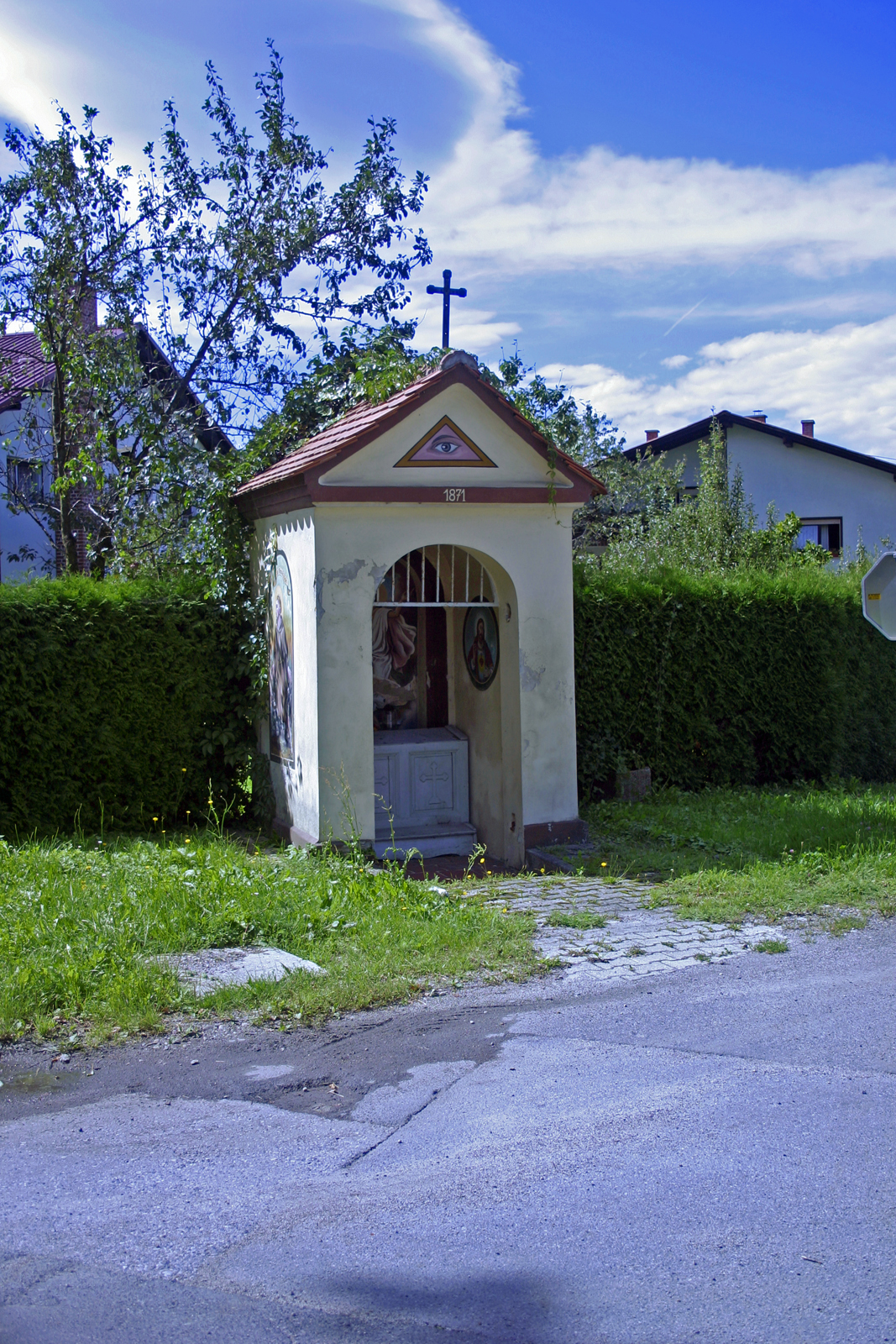 Grofova kapelica na Tišini. Earl's small chapel in Tišina. Grafs kleine Kapelle in Tišina